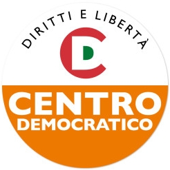 Simbolo del Centro Democratico